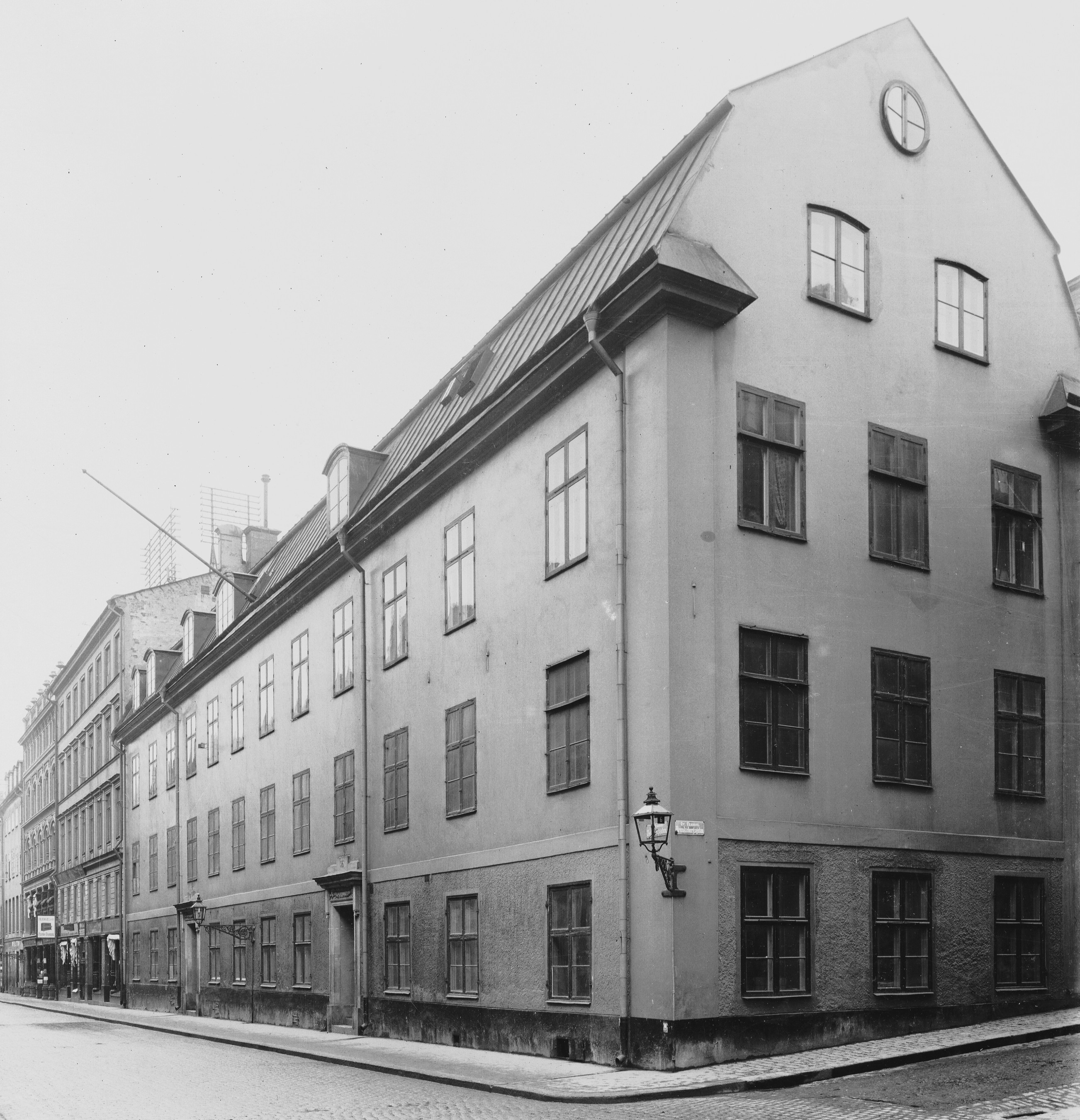 Hus i hörnet Drottninggatan - Brunkebergsgatan Plats: Kvarteret SKANSEN. Brunkebergsgatan 6 (Förmodad). Drottninggatan 36. Norrmalm. Ämne: Offentliga byggnader.